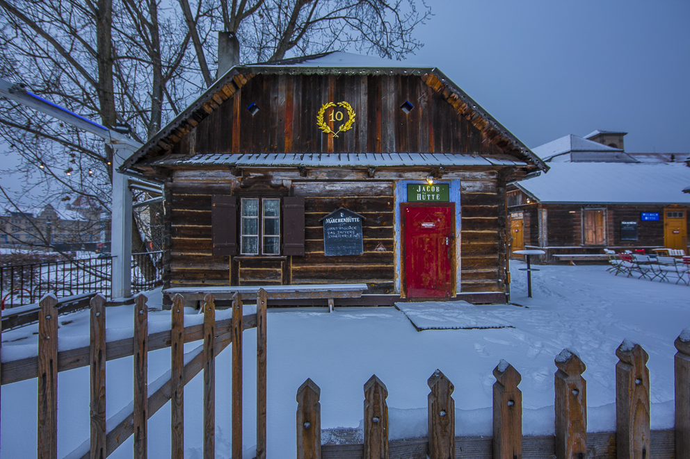 Berlin, Januar 2016 Winterliche Märchenhütte im Monbijou Park in Berlin Mitte. Veranstalter ist das Monbijou Theater. © bernd schönberger